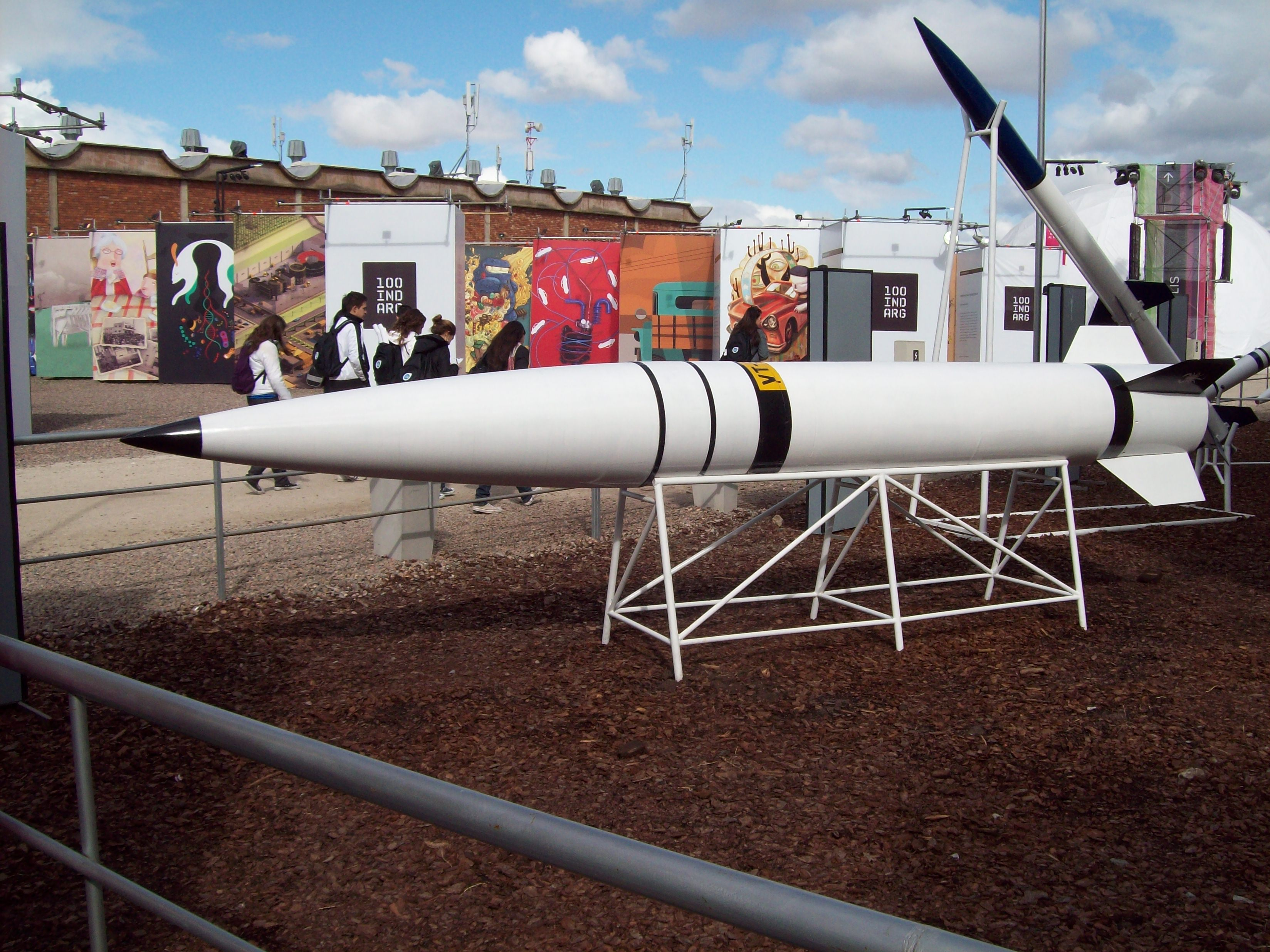 Cohetes de diversos tamaños en Tecnópolis. Alacrán Cóndor I-A III